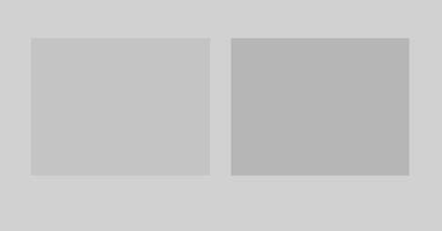 La figura de la derecha tiene un mayor contraste con el fondo que la de la izquierda. Origen: realizado ayer en Power Point.